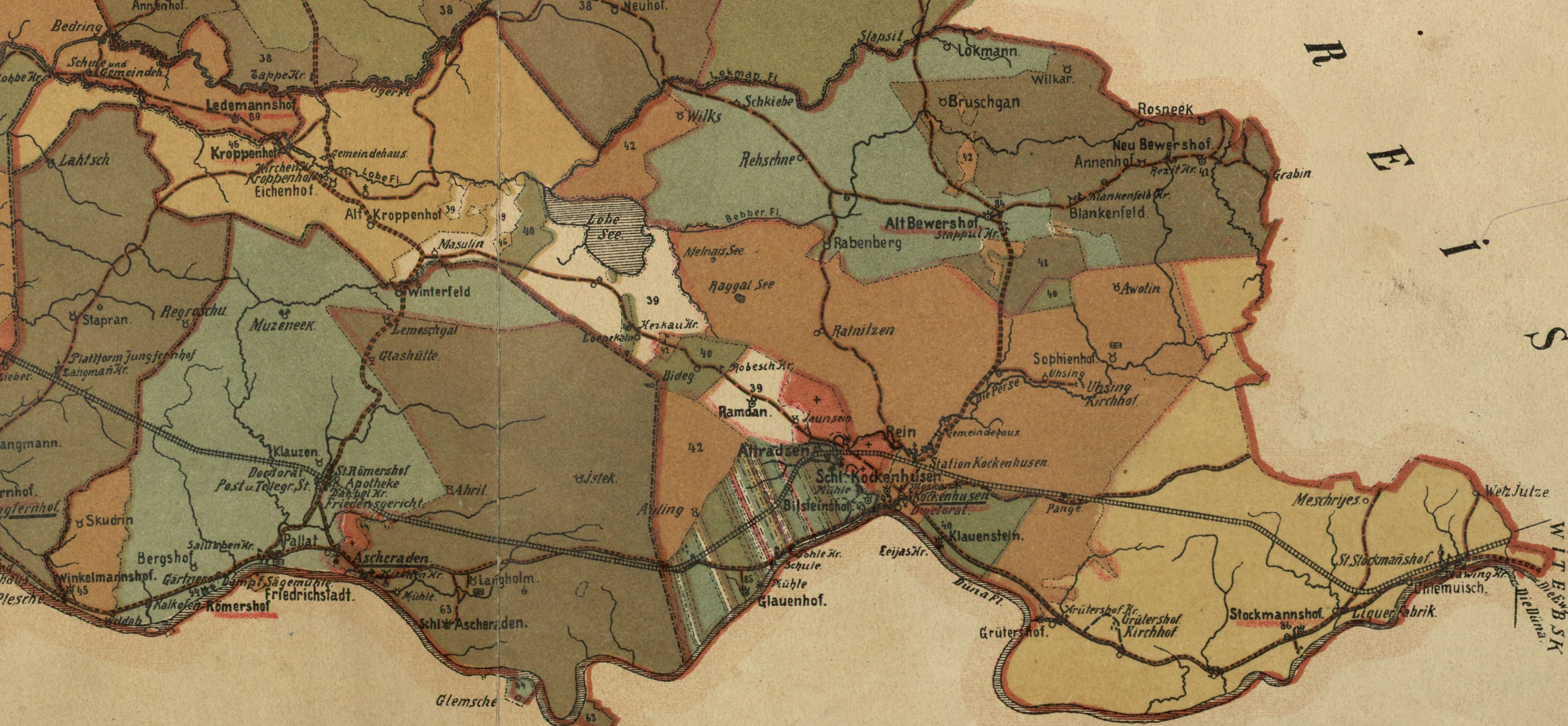 Koknese kihelkonna mõisad 1905. aastal